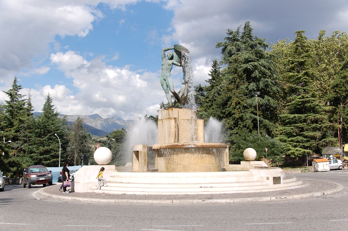 L'Aquila 2011